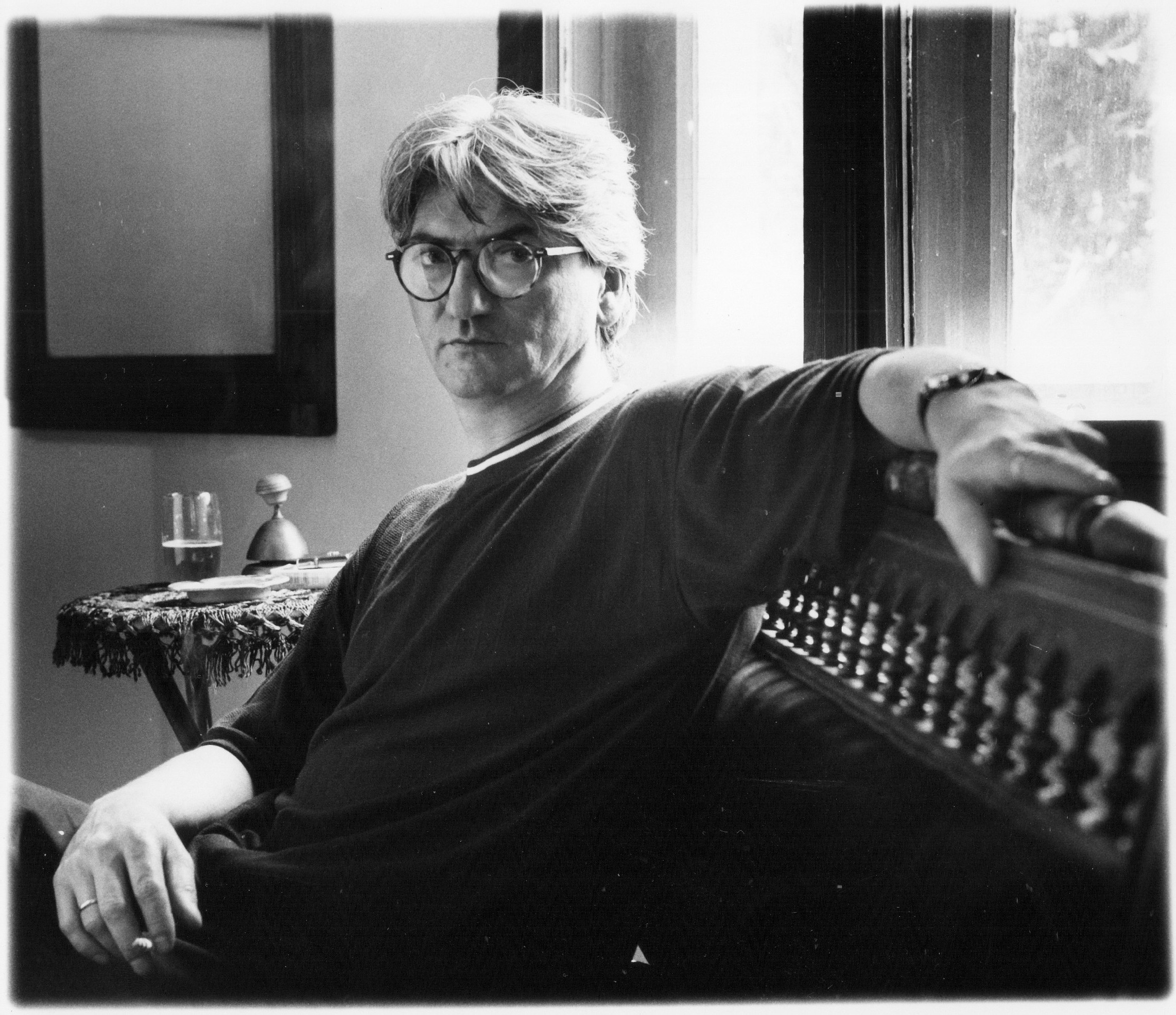 Srpskohrvatski / српскохрватски: Milinko Koković, portret